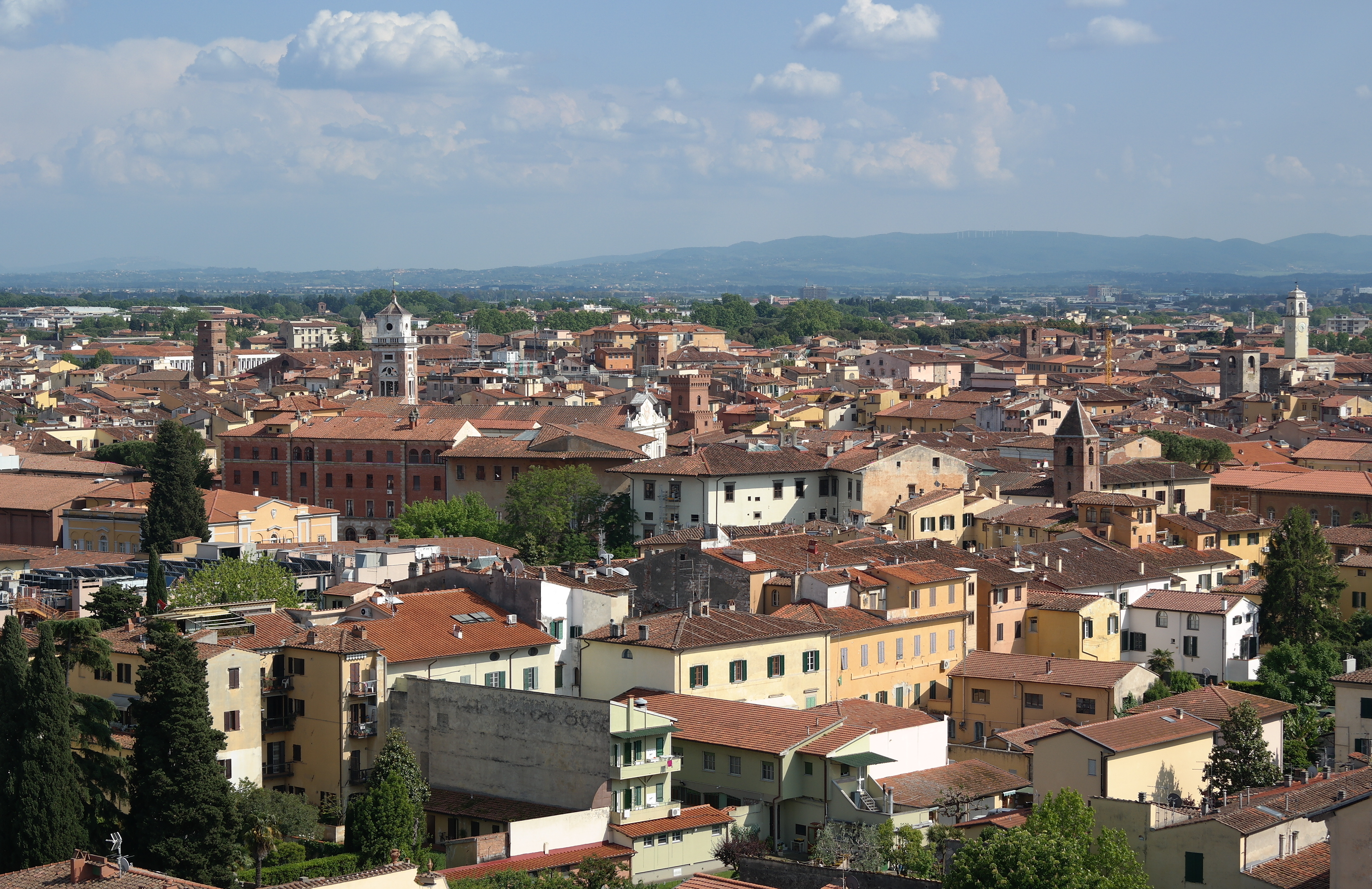 Panorama di Pisa dalla Torre pendente